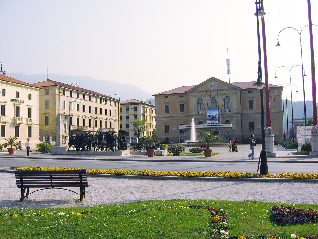 Municipio di Vittorio Veneto.